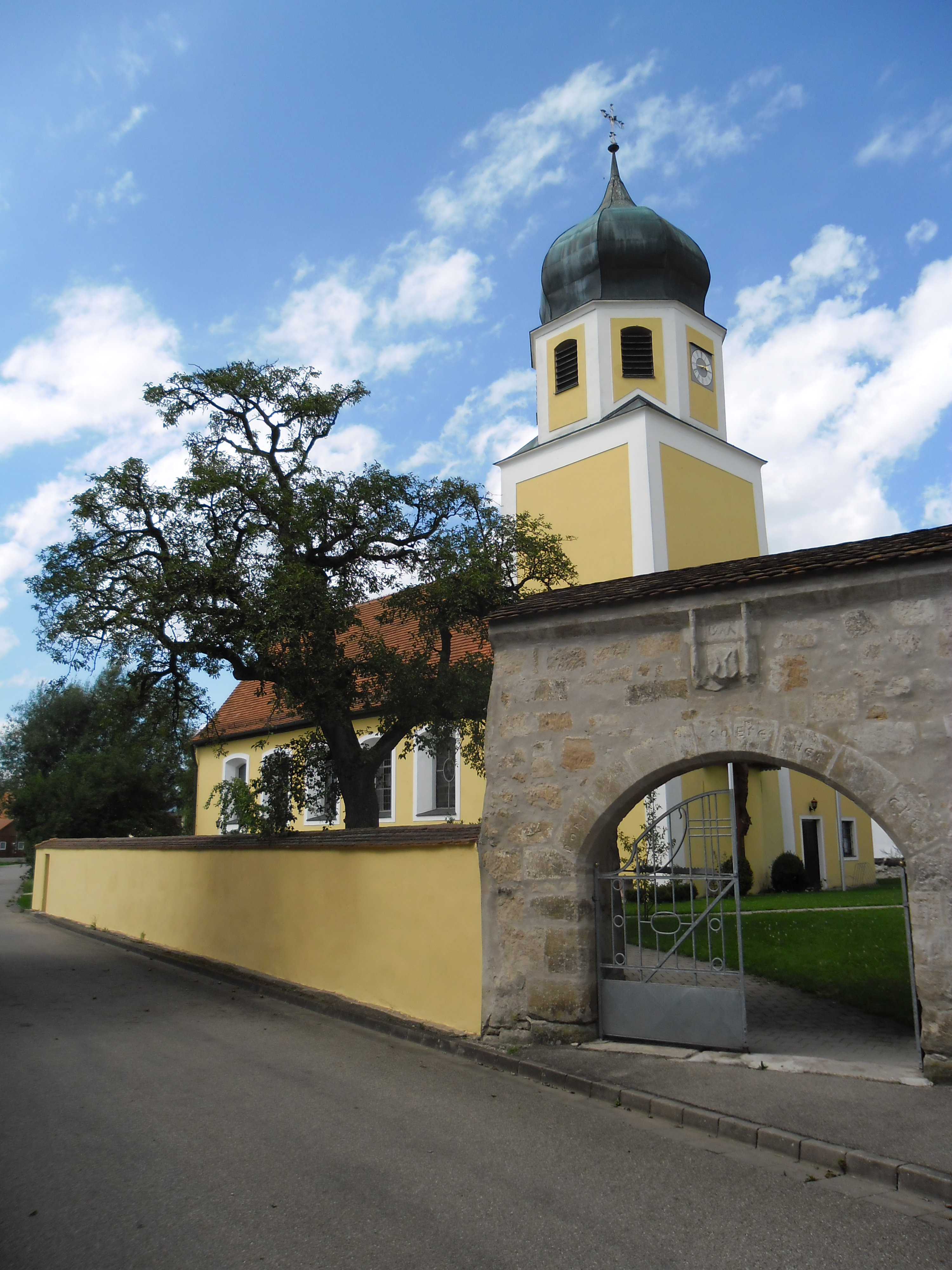 Friedhofstor und Kirchturm in Cronheim